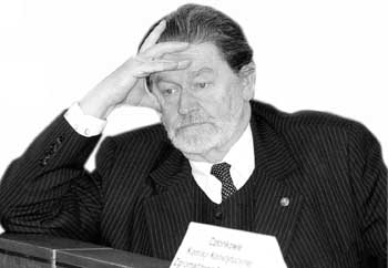 Aleksander Małachowski. Plik pochodzi ze strony za zgodą jej admina Bogdana Misia, Lzur 16:07, 27 sty 2004 (CET)